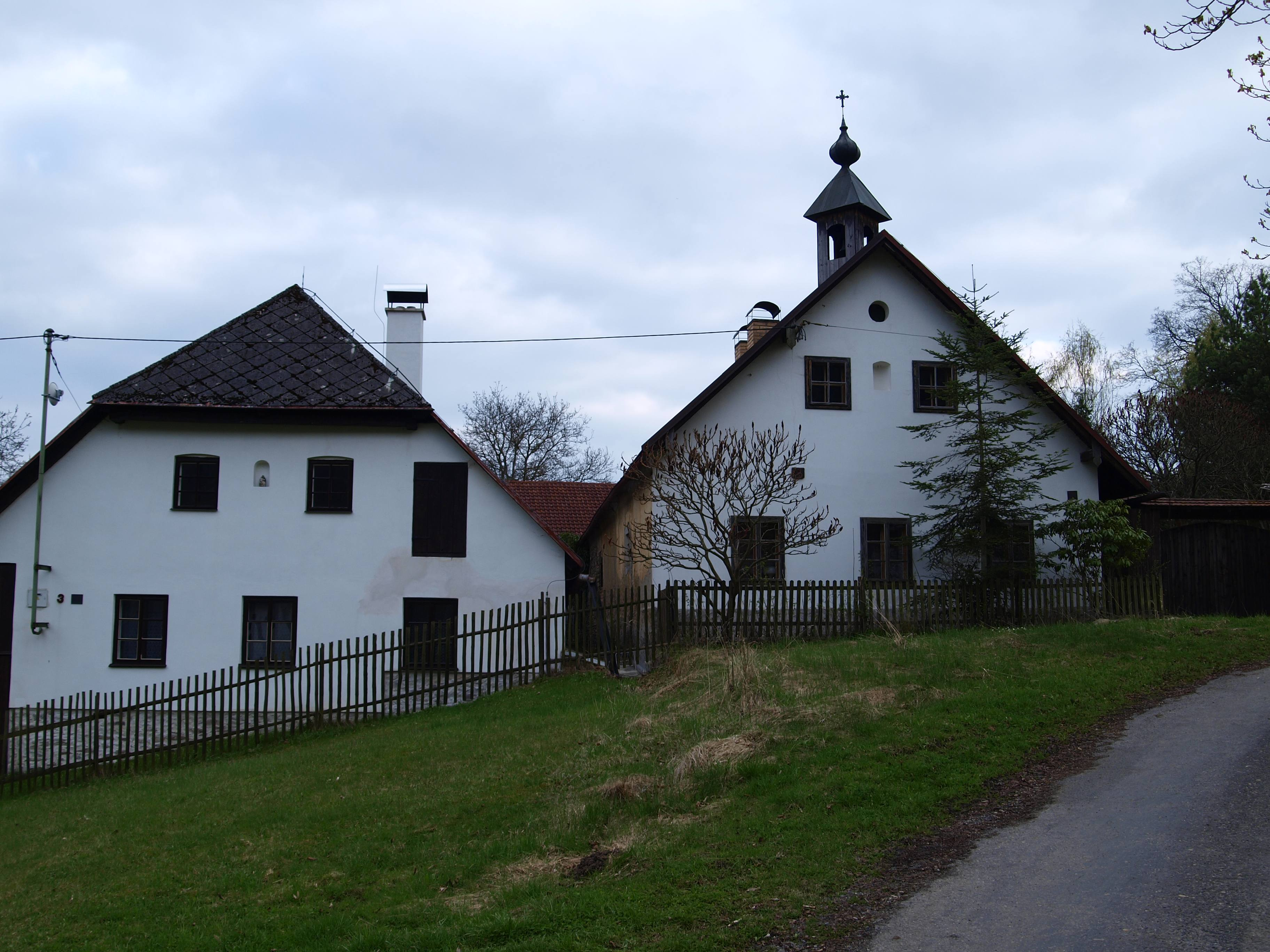 Nuzerov (okr. Klatovy), čp. 3 a če. 4 od severu. Obě stavby jsou nemovitou kulturní památkou